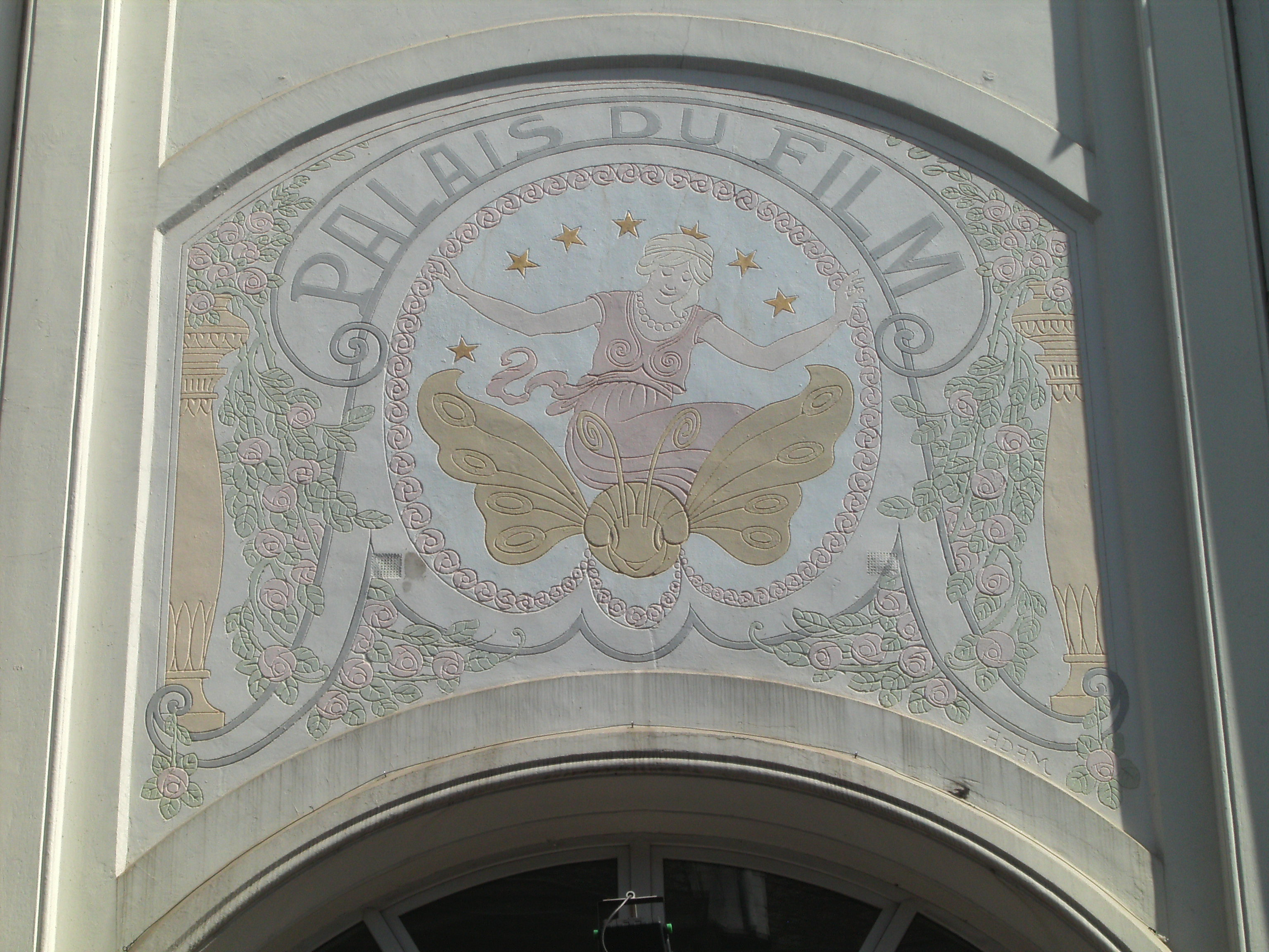 Charleroi (Belgique) - rue Neuve - ancien cinéma "Le Palais du Film" (détail) - Sgraffite signé "(Gustave) Adam"